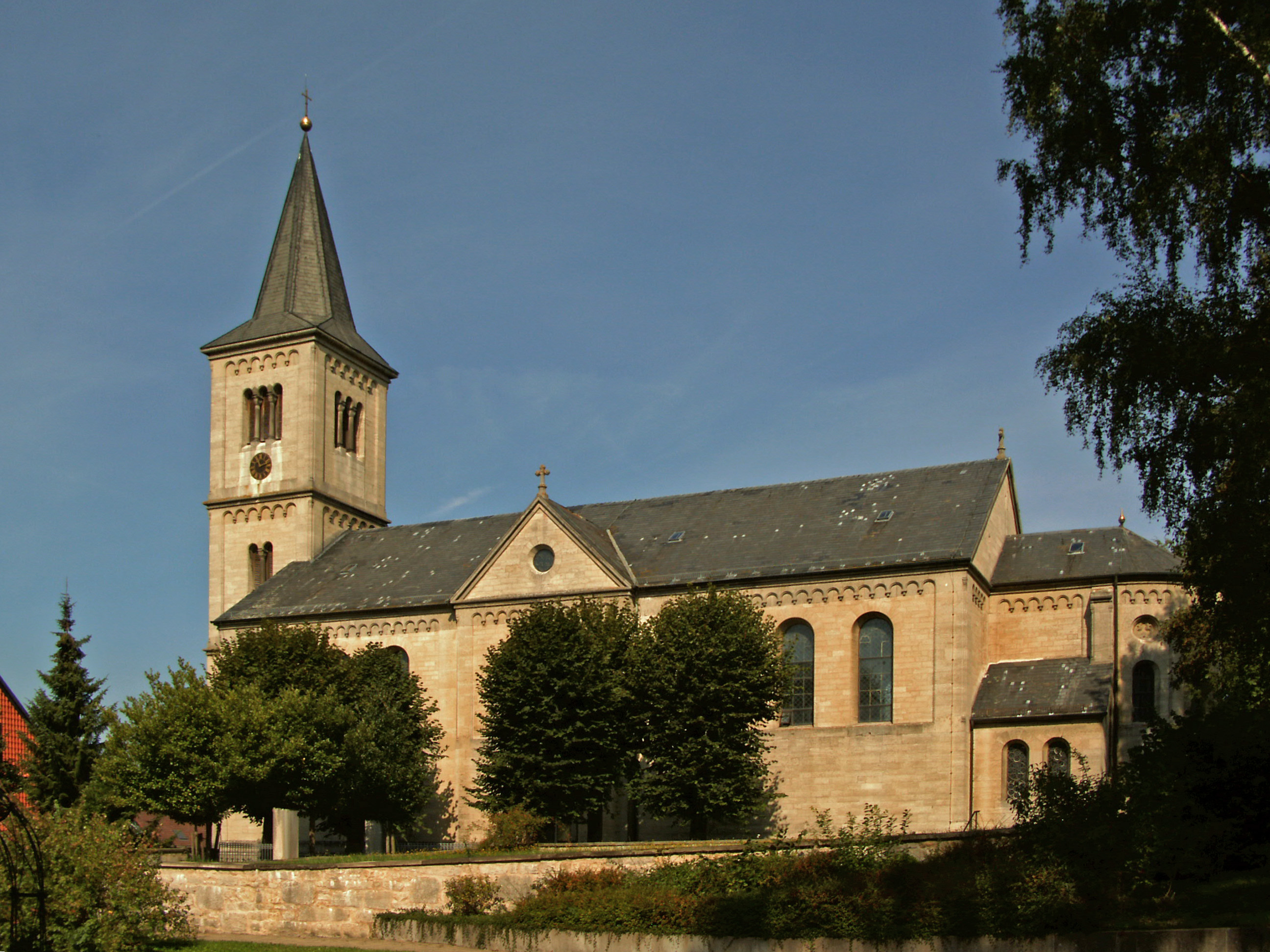 Katholische Kirche Maria Geburt in Winzenburg, Südseite, Landkreis Hildesheim